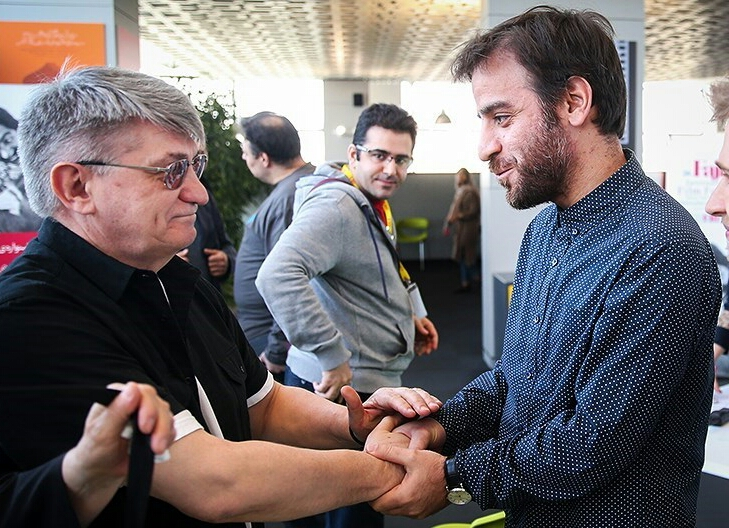 شهرام مکری - الکساندر سوکوروف - ۱۳۹۵